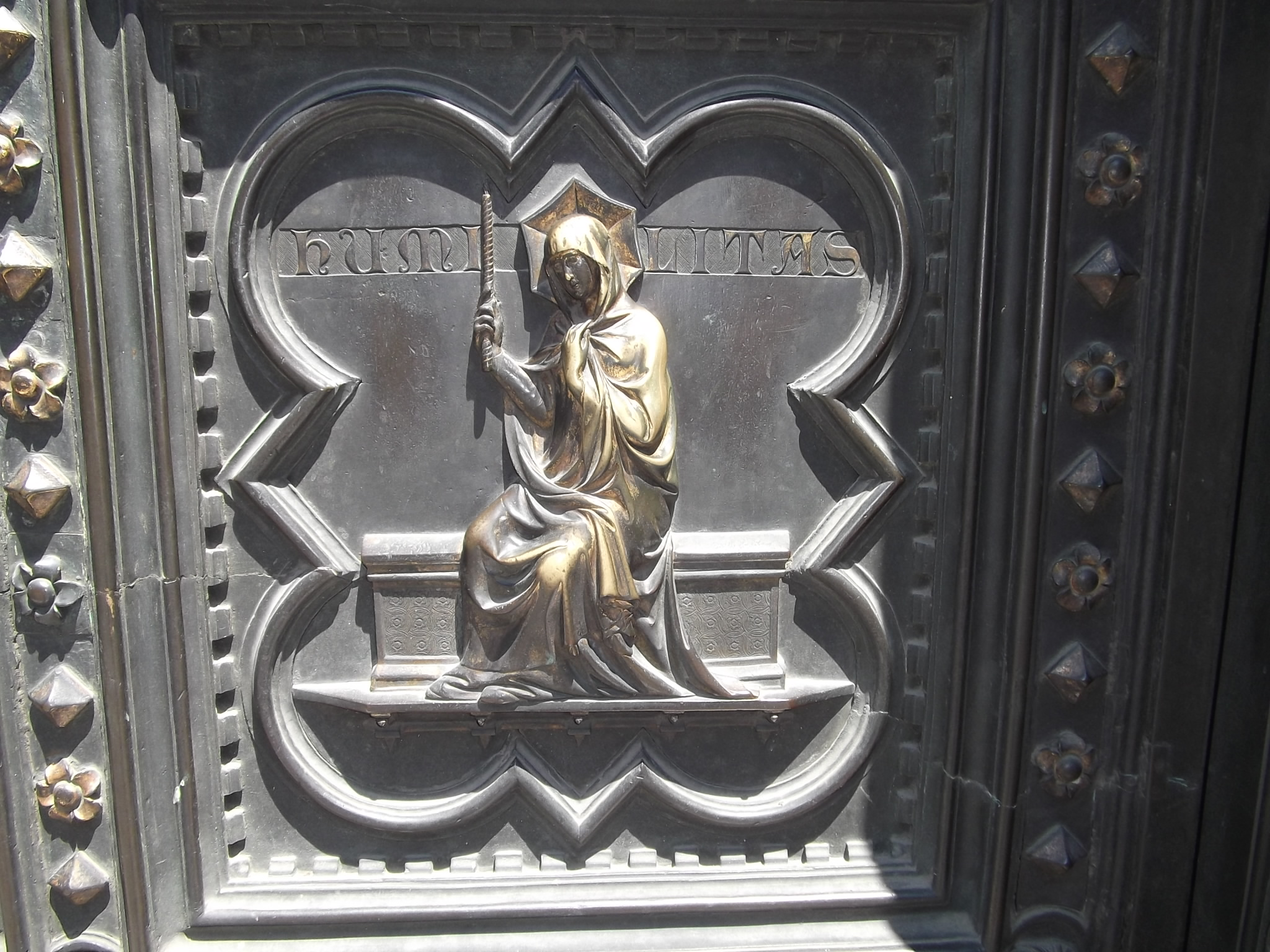 Humilitas auf Portal des Baptisterium San Giovanni in Florenz